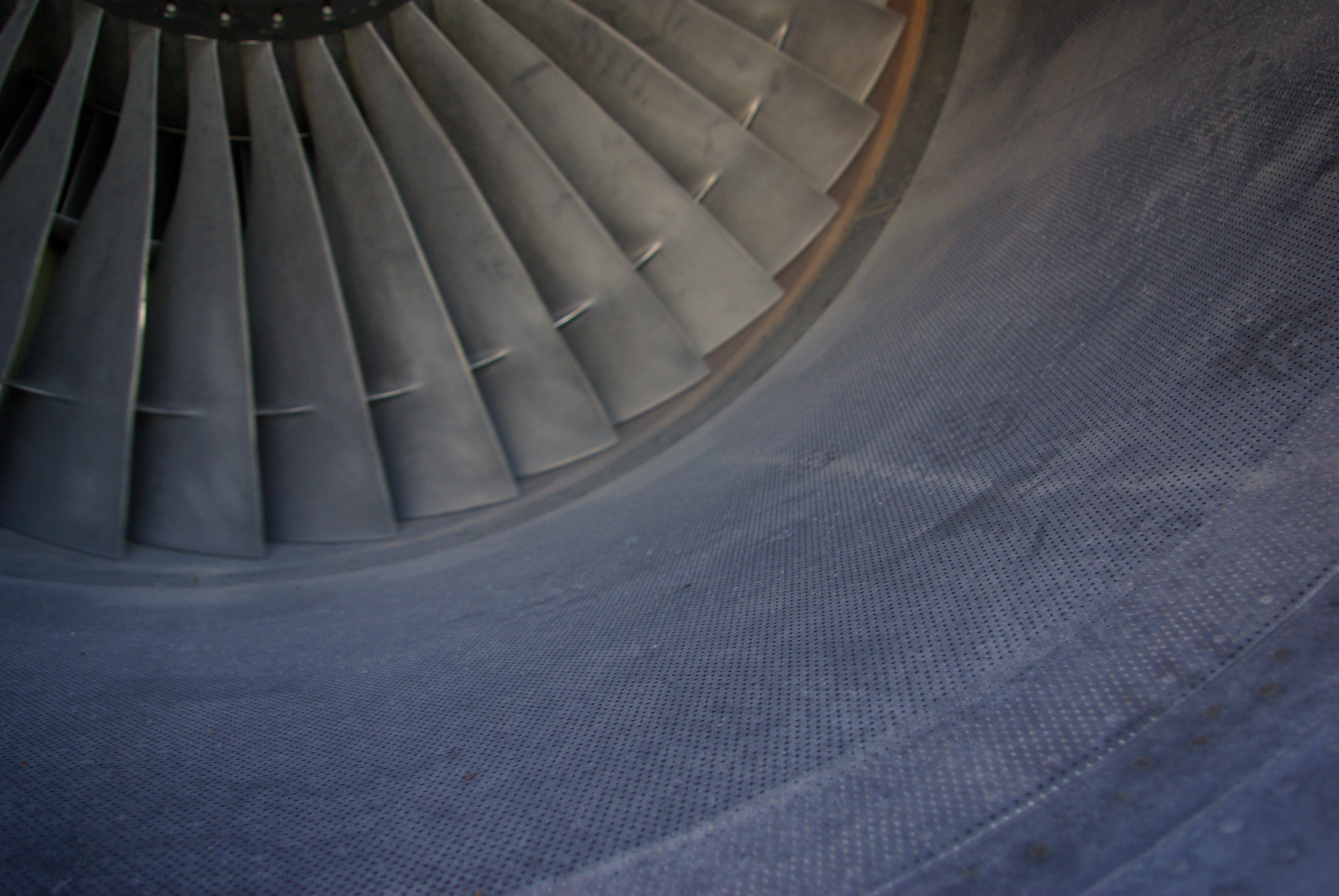 Fan et nacelle d'un moteur General Electric CF-6 d'Airbus A300. L'intérieur de la nacelle est microperforée pour réduire l'intensité du bruit.